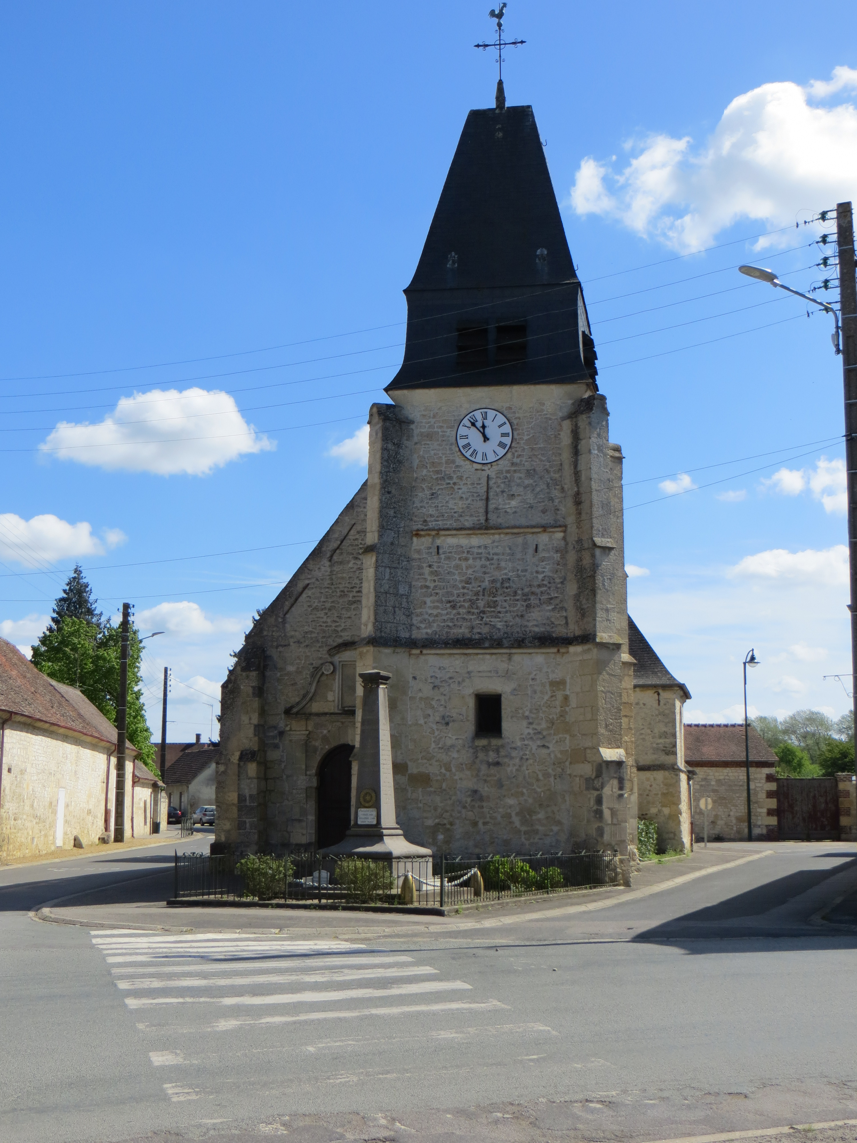 Vue générale de l'église